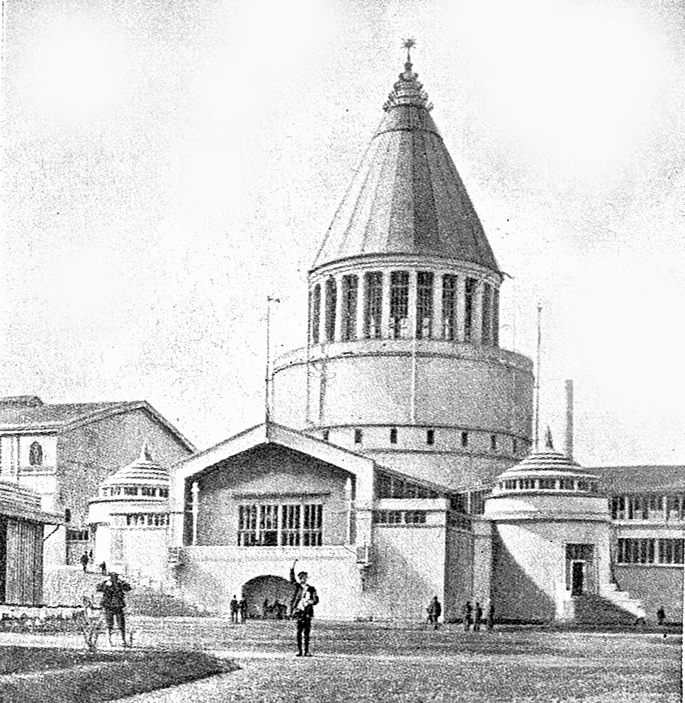 Elekricitetsbygningen på Landsudstillingen i Aarhus 1909 tegnet af arkitekt Anton Rosen.